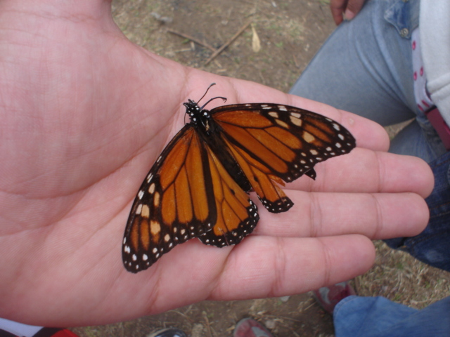 Monarca en Valle de Bravo